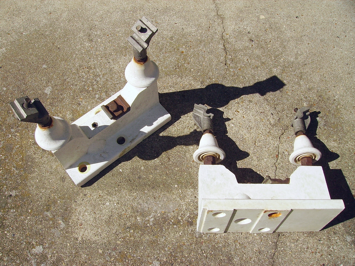 Des supports de rail d'alimentation électrique, ayant servi pour l'aérotrain S44.